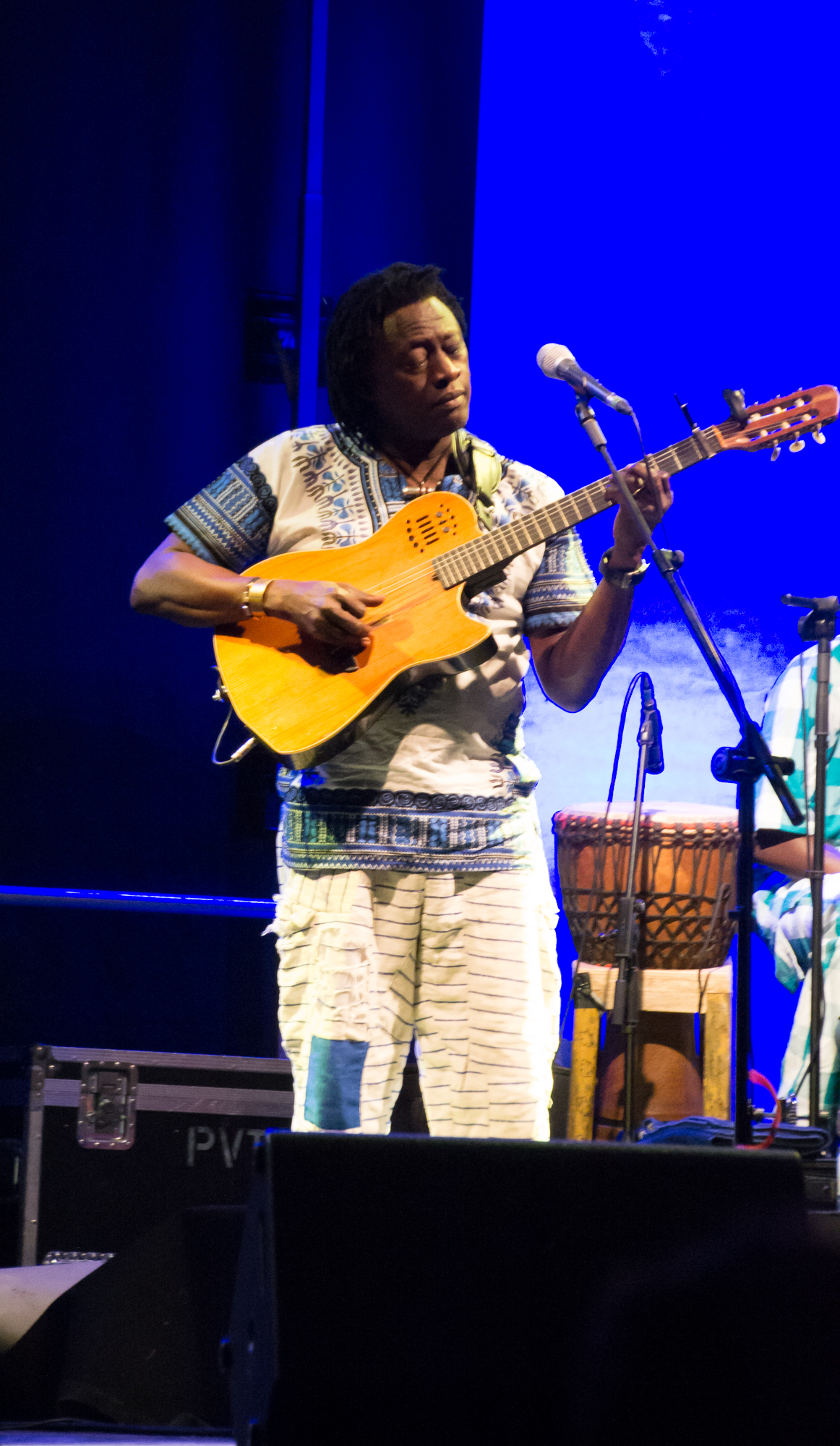 Habib Koité & Band 2014 in Detmold